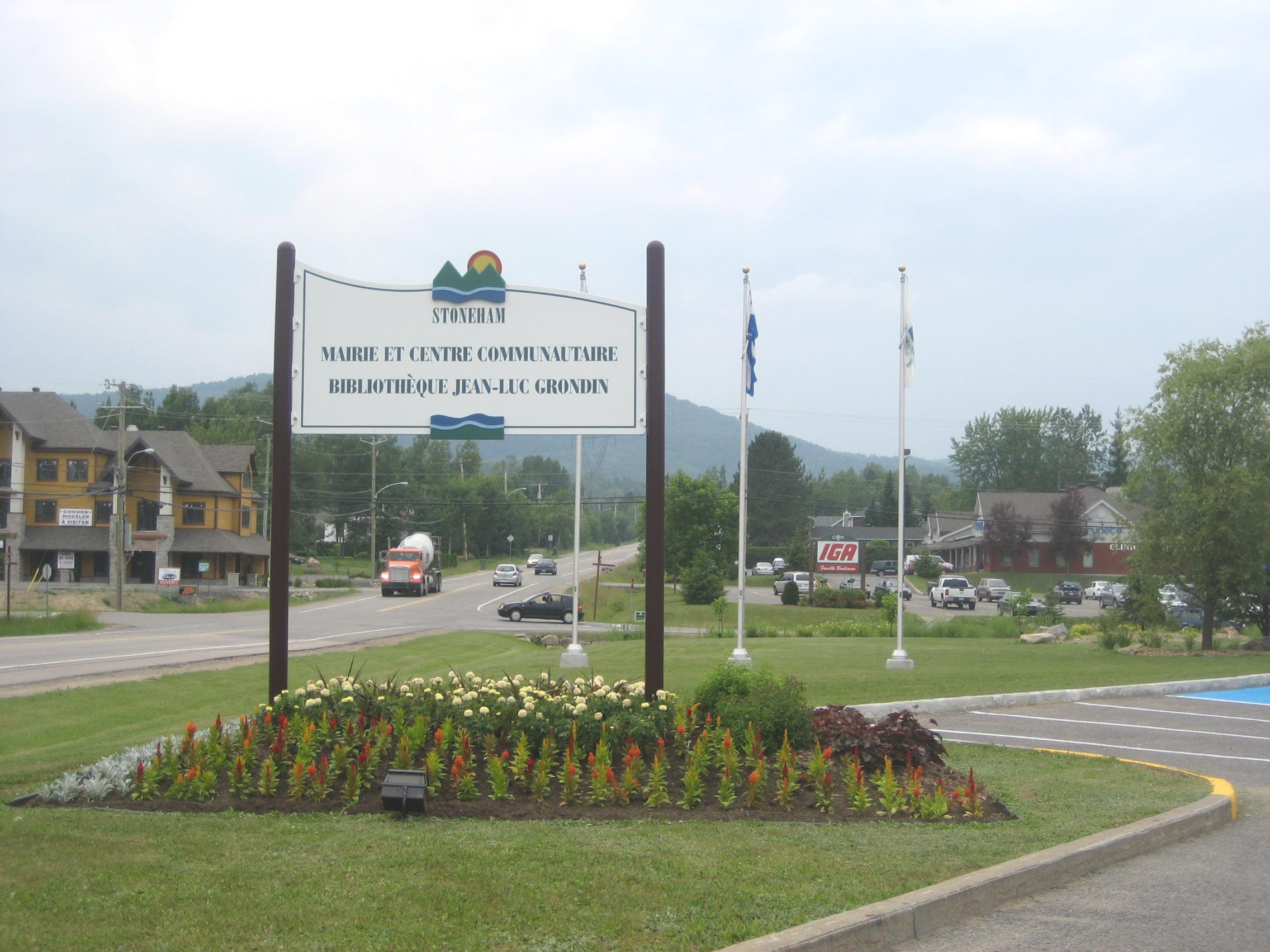 Mini centre-ville vu du complexe municipal de Stoneham Québec Canada